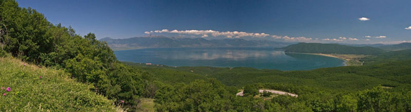 Панорама на Преспа